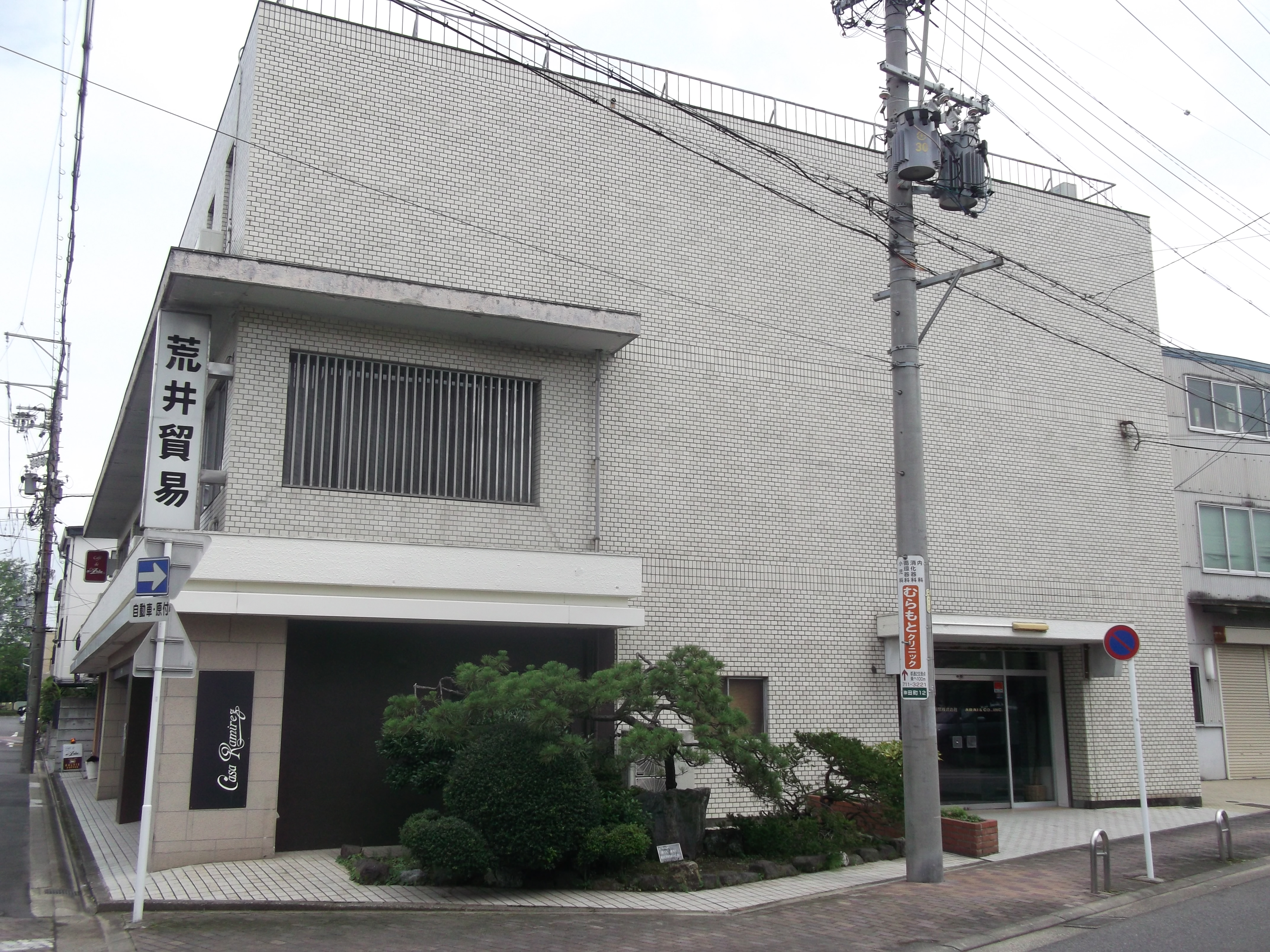 名古屋市千種区の荒井貿易本社を西側公道より撮影